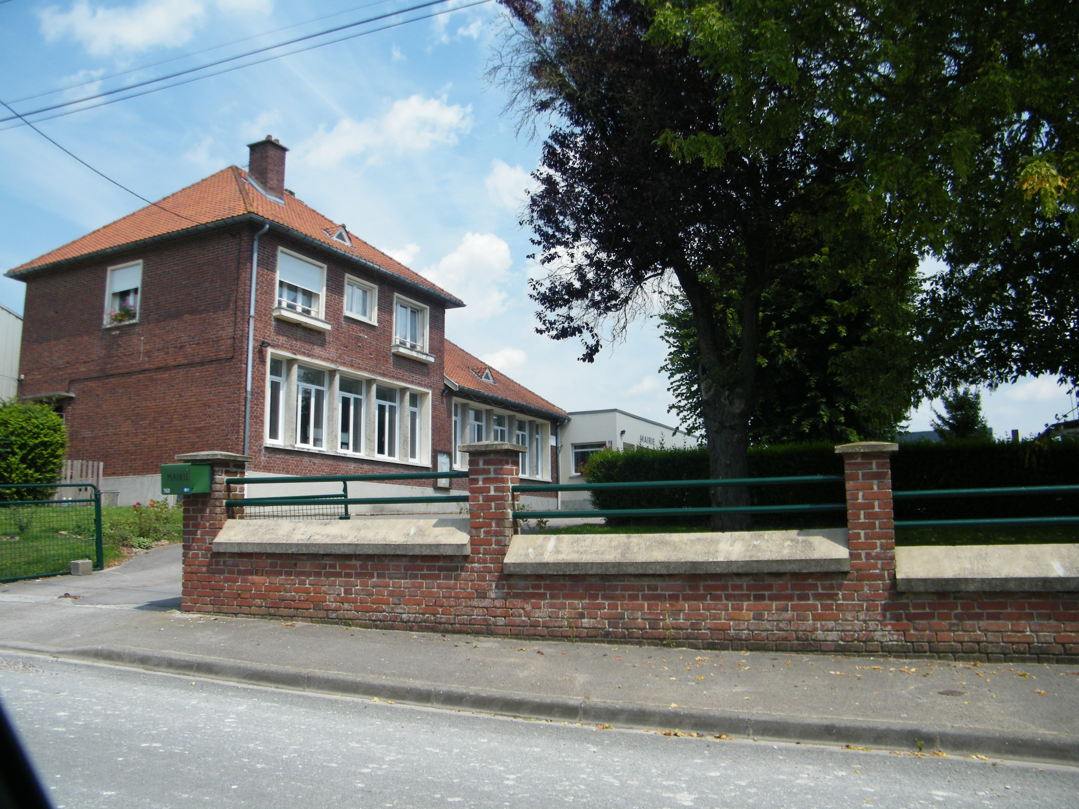 école.